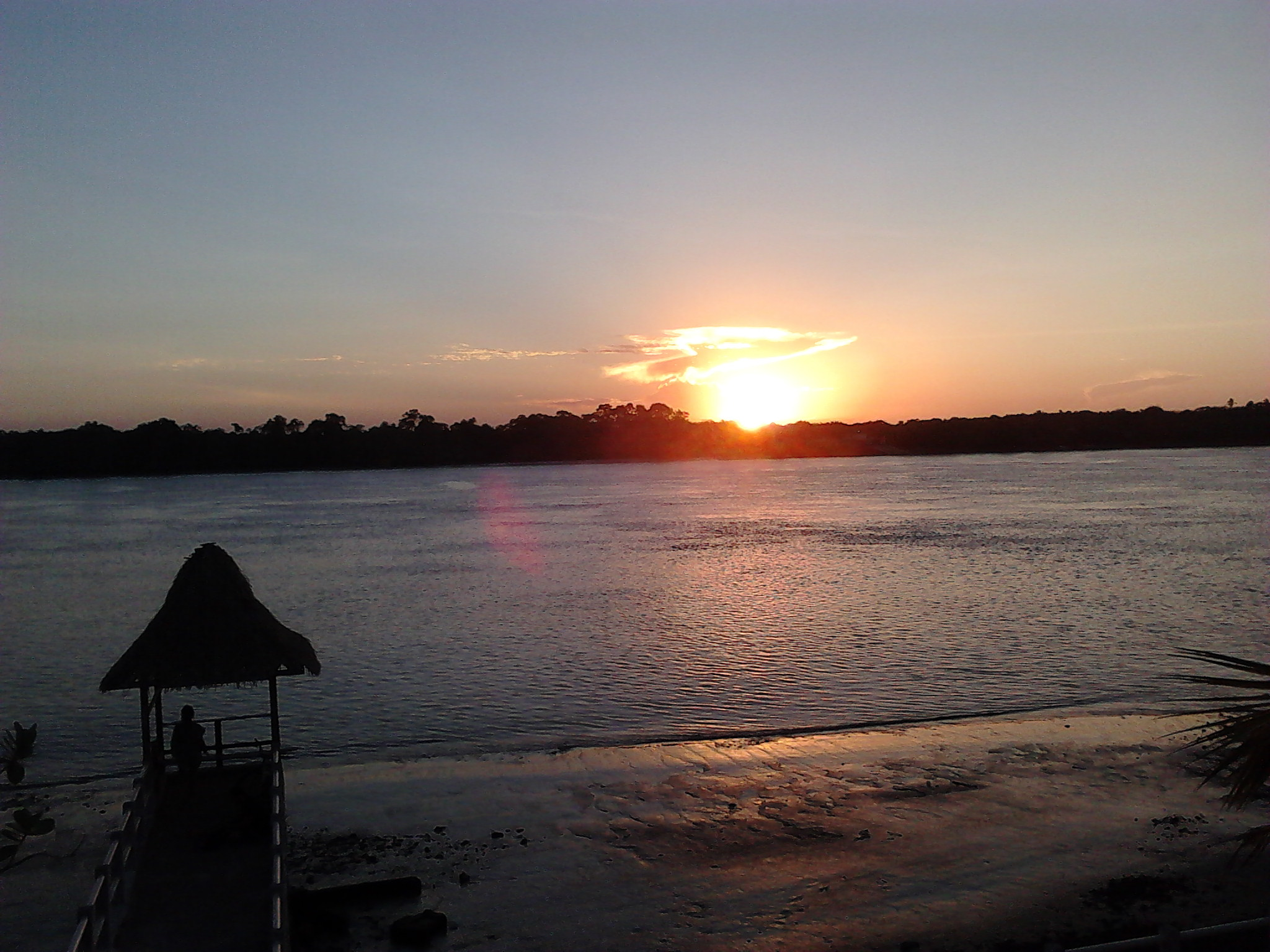 Soure, localizado na Ilha de Marajó no Estado do Pará.